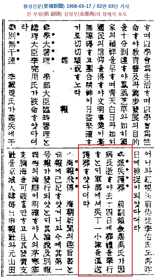 김광서(김경천) 장군의 부친 김정우씨가 병으로 서거하여 장례식을 거행했다는 기사 황성신문(皇城新聞) 1908-03-17 / 02면 03단 기사.